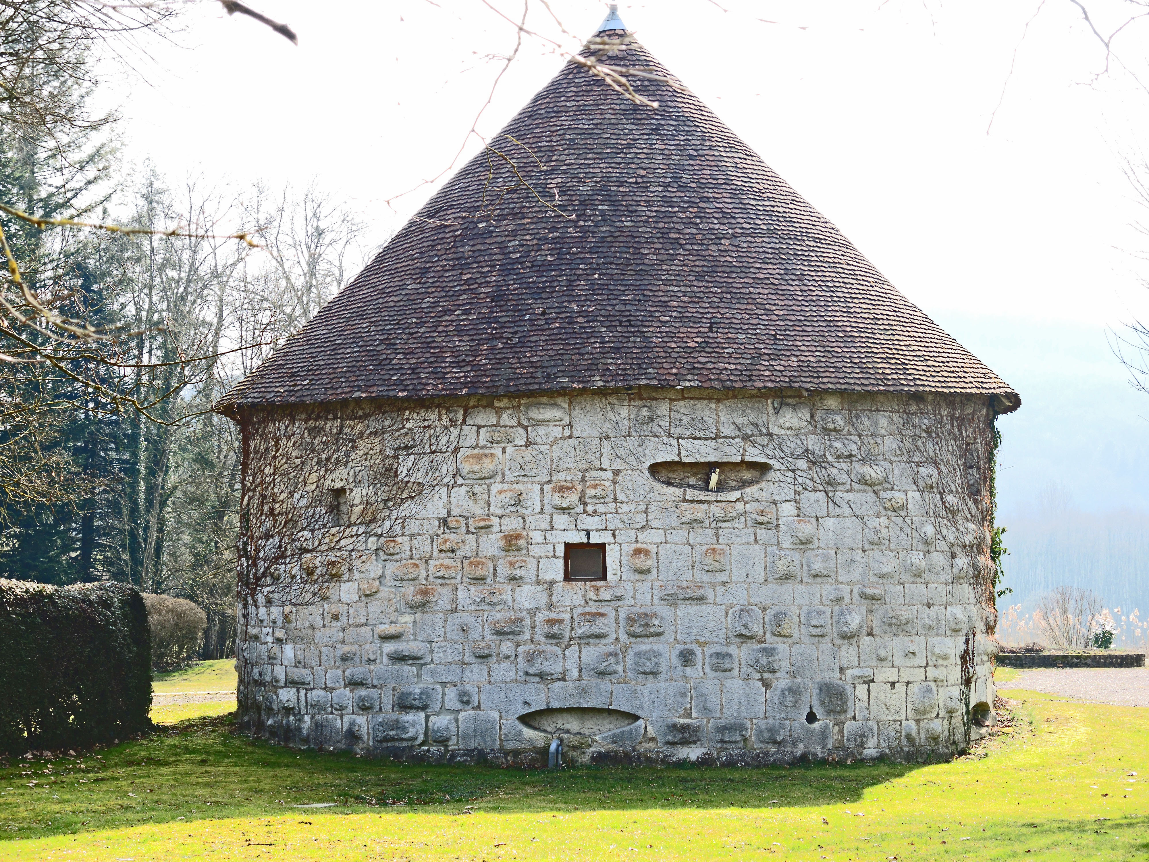 Tour Est de l'ancien château du XVIII è siècle de Soye.